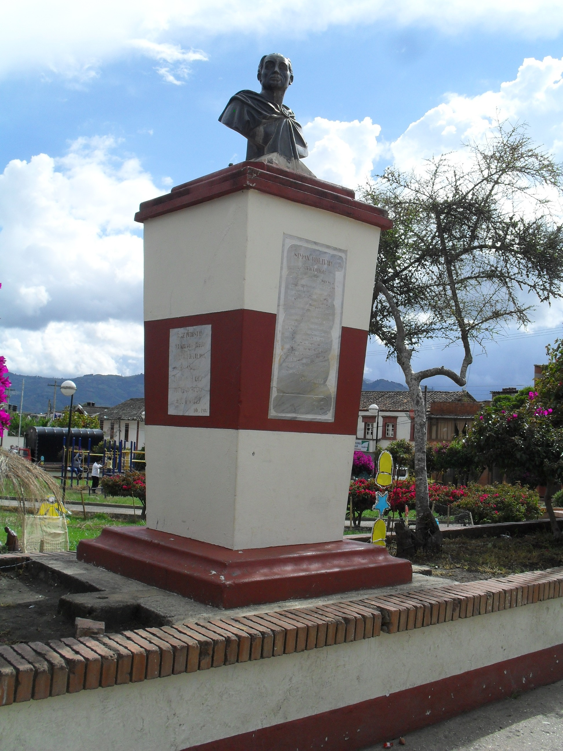 Busto de Simón Bolívar en el Municipio de Nuevo Colón, Boyacá, Colombia